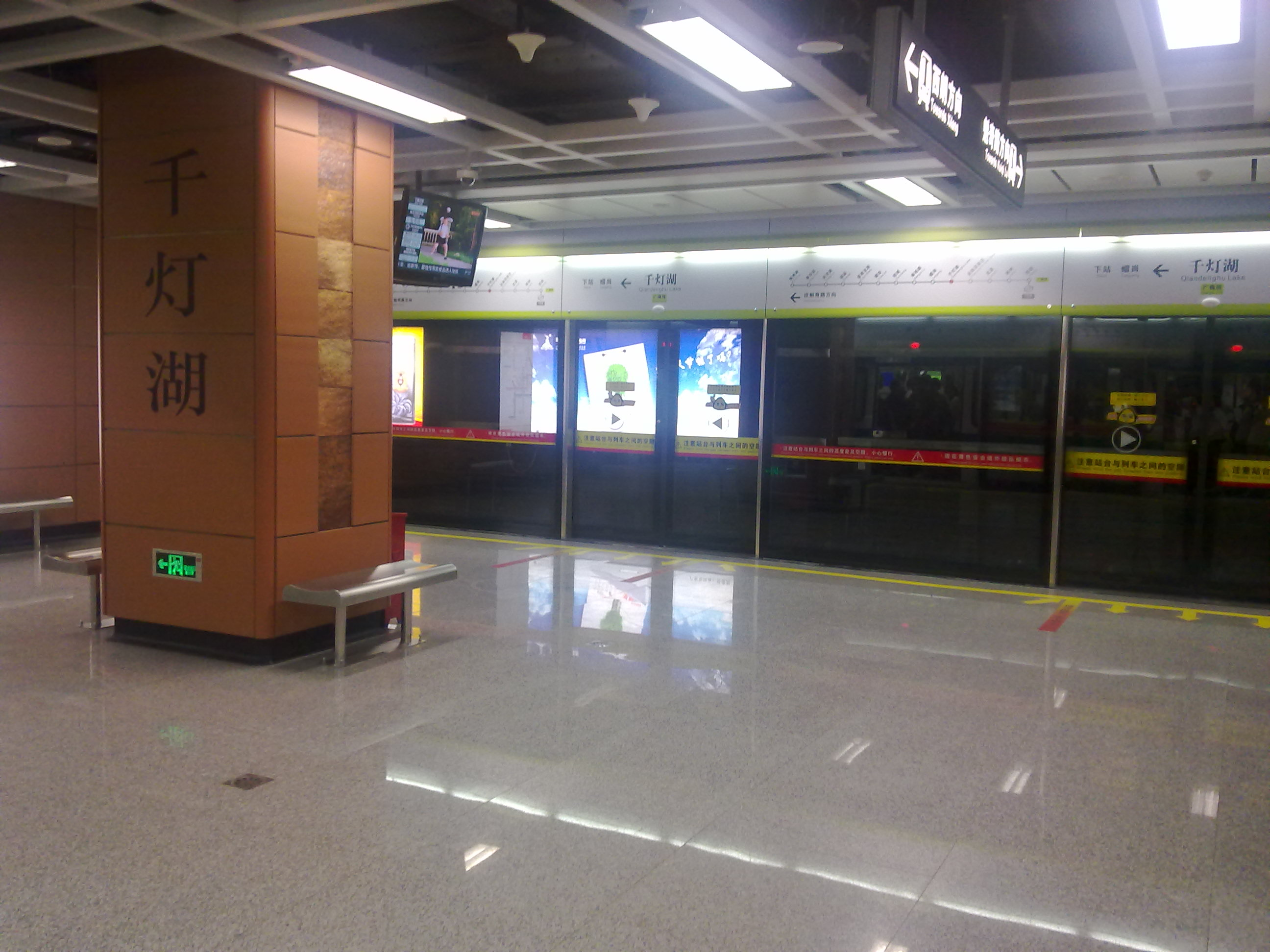 廣佛地鐵千燈湖站站台